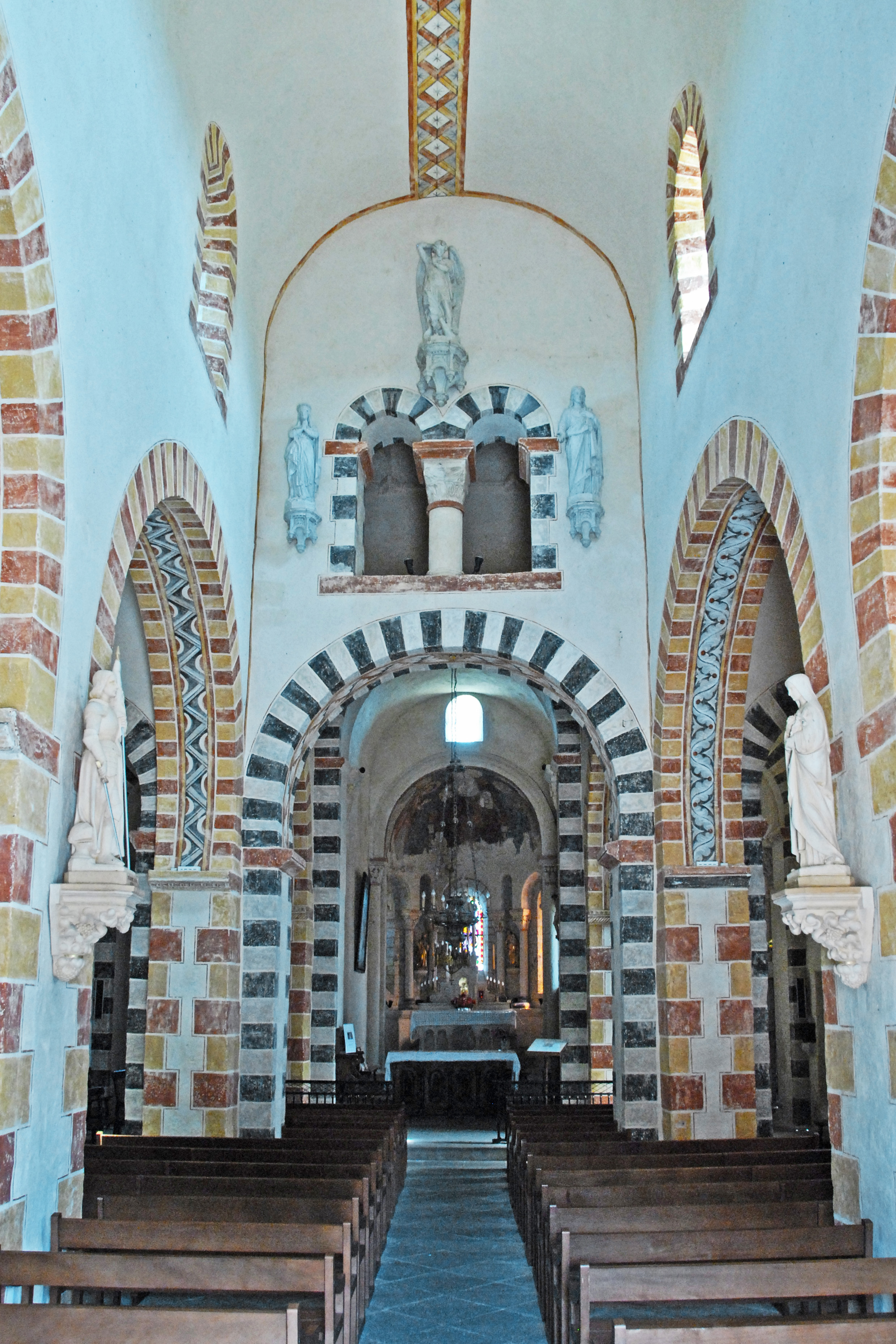 St.-Jean Glaine-Montaigut, Mittelschiff aus Joch 1